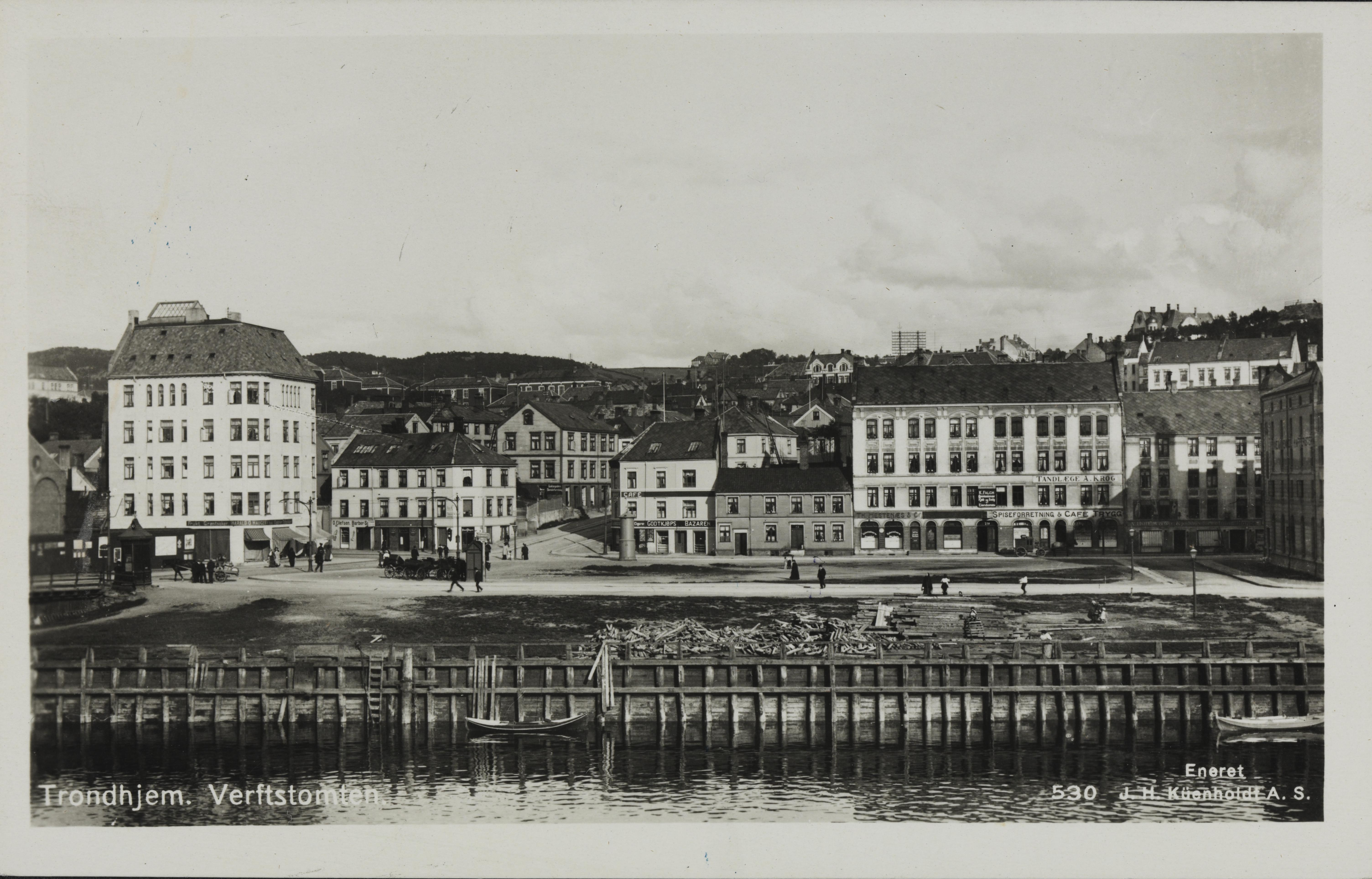 Bildet er hentet fra Nasjonalbibliotekets bildesamling Møllenberg, Trondheim, Sør Trøndelag